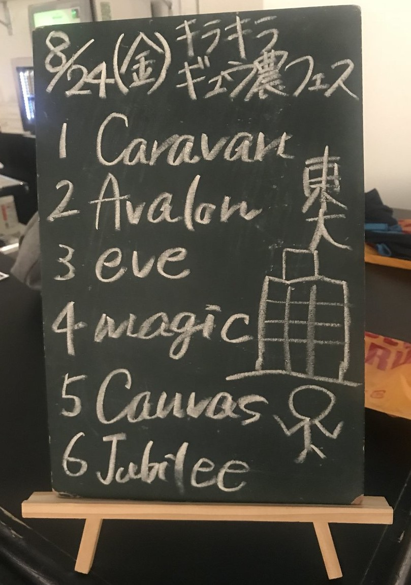 amiinAセトリボード(20180824(1))